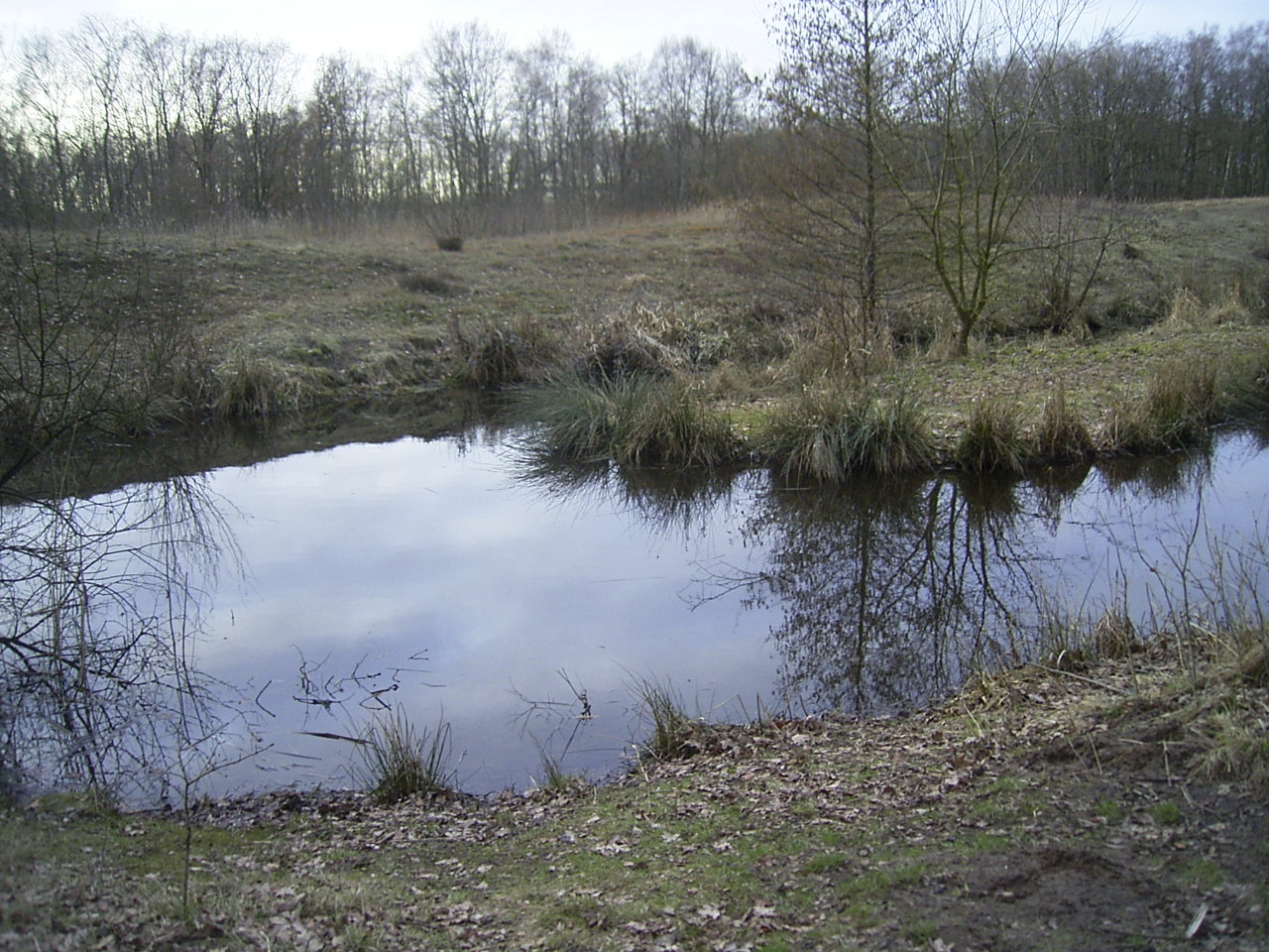 Das Rothsteinsmoor, in Langenhorn zwischen dem Krohnstieg und der Umgehung Fuhlsbüttel gelegen, wurde 2009 unter Schutz gestellt.